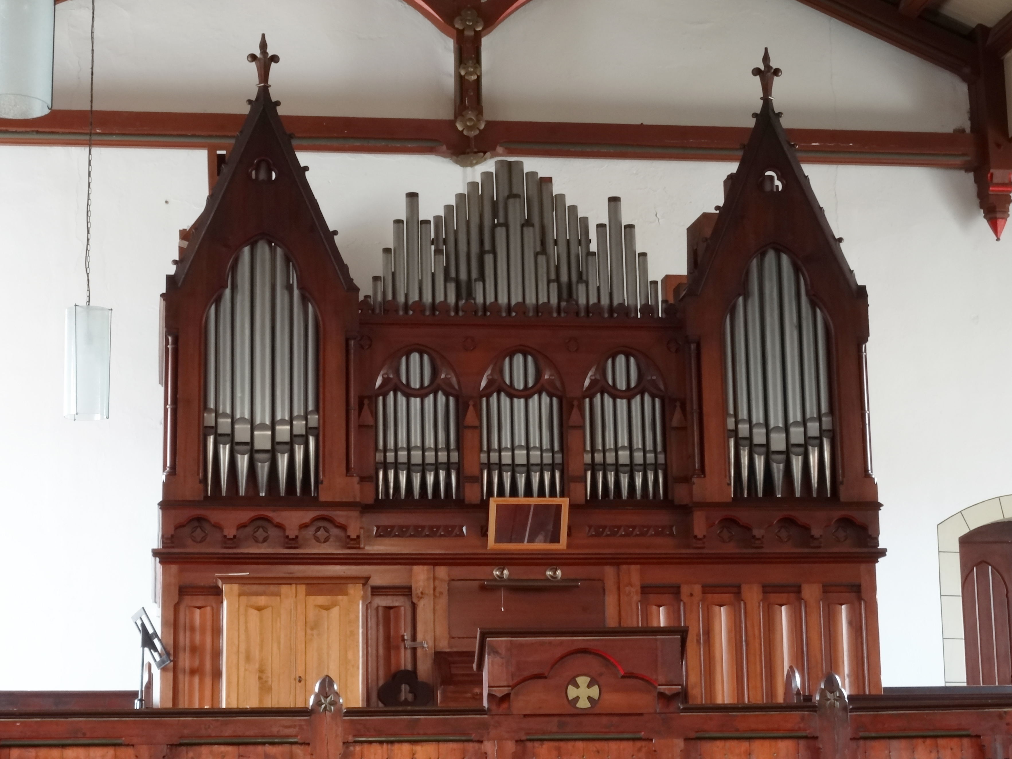 St. Nicolai (Brotterode), Orgel von Wilhelm Rühlmann 1901